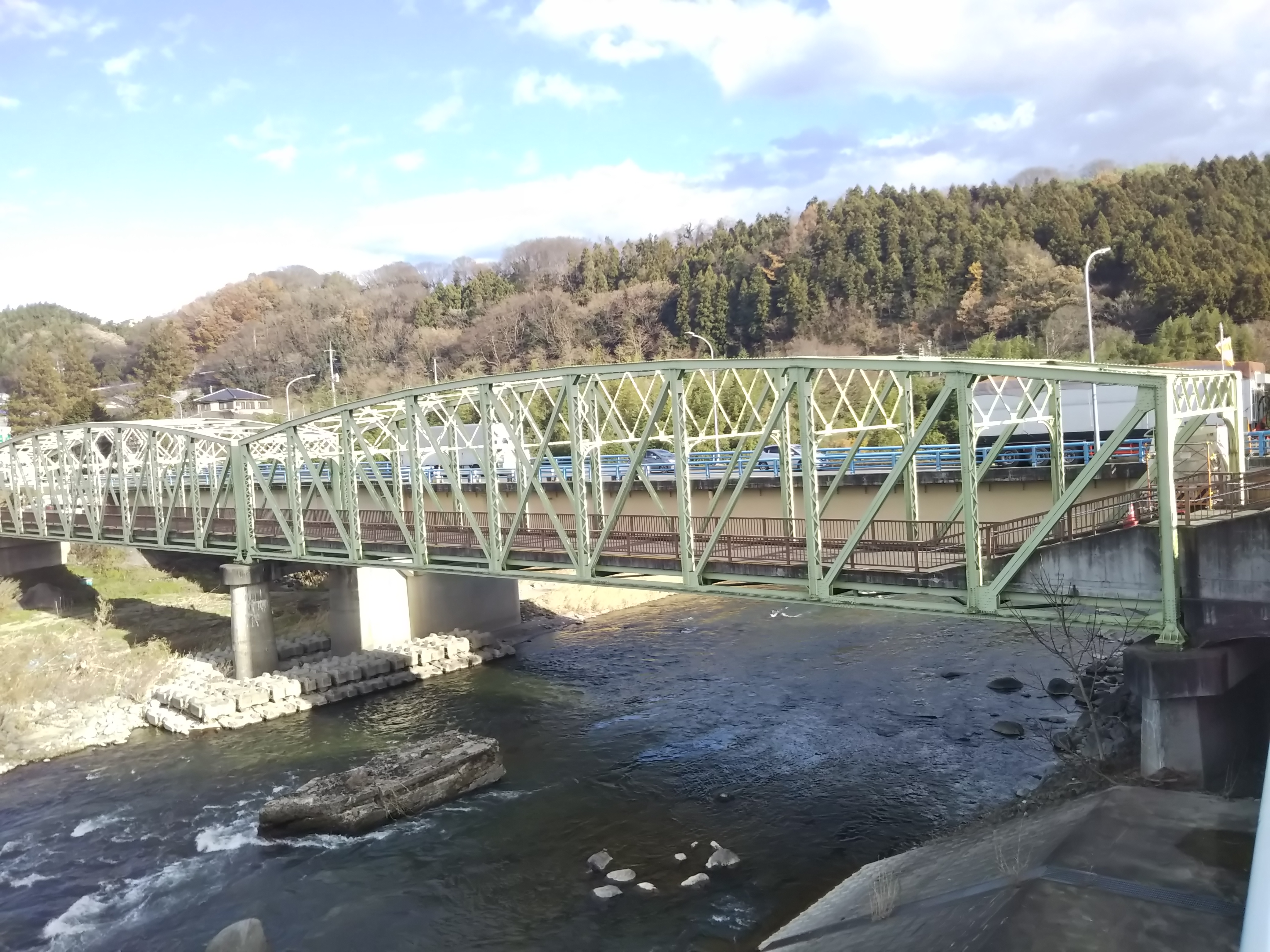 群馬県沼田市、利根川を渡る鷺石橋